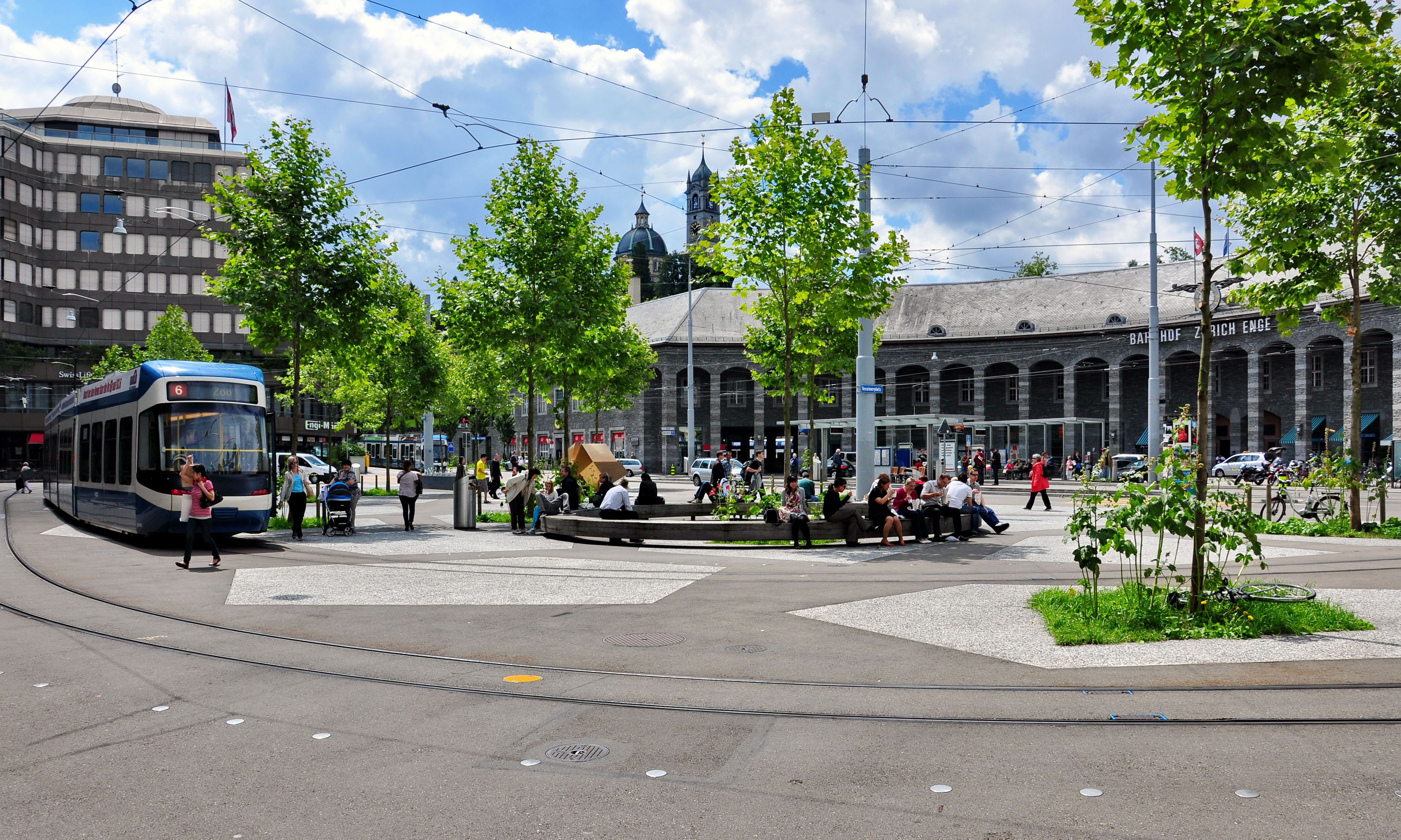 Tessinerplatz in Zürich-Enge (Switzerland)